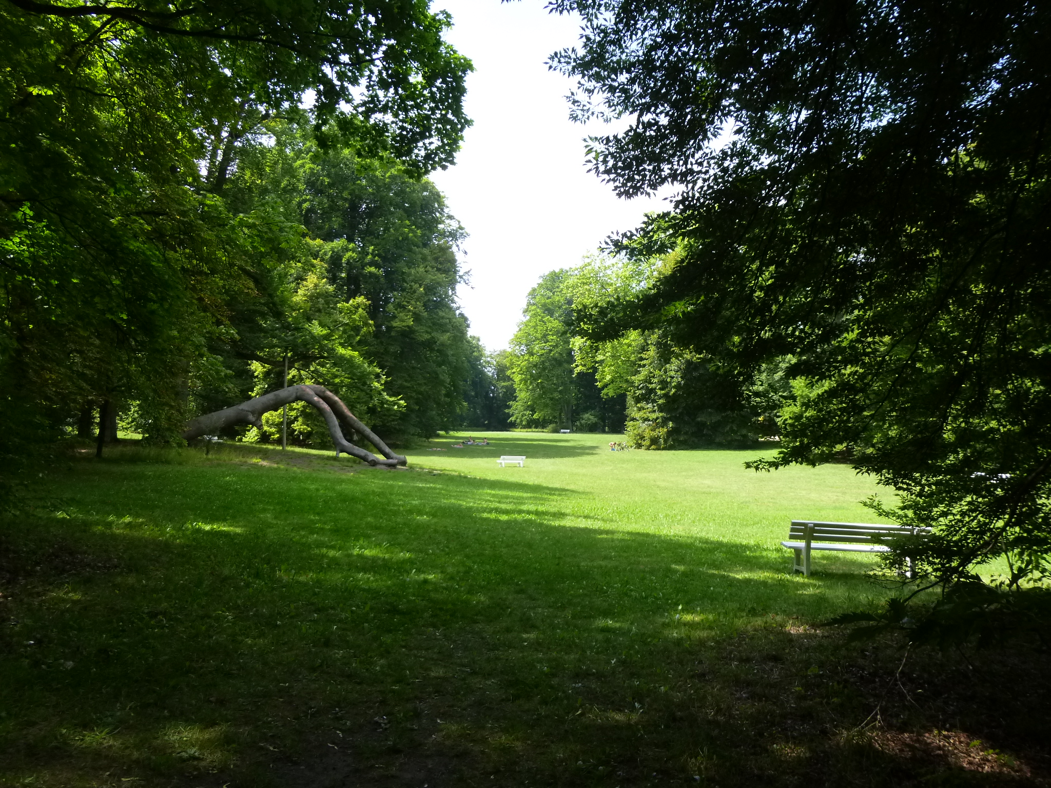 Blick in den Dörnberg-Park in Regensburg mit altem Baumbestand.This is a photograph of an architectural monument.